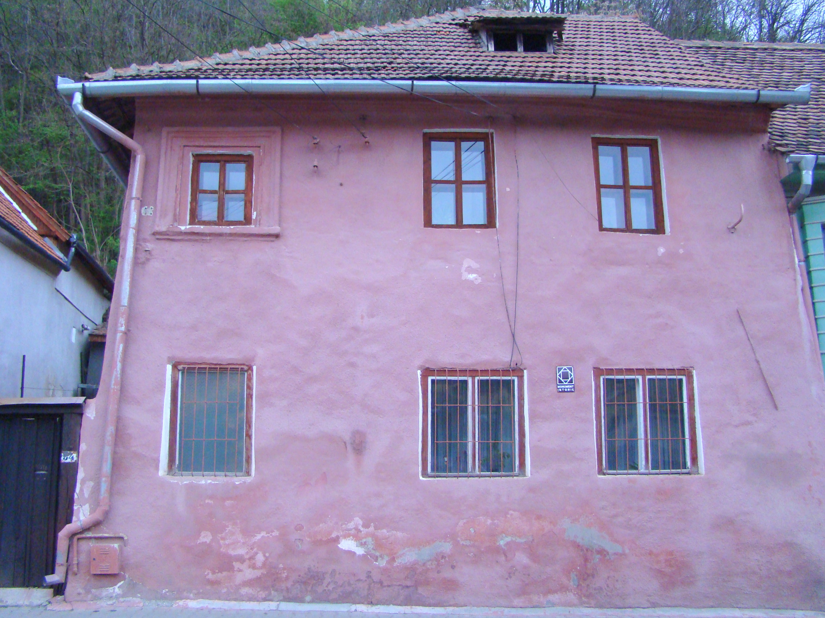 Casă, municipiul Sighișoara, str. Chendi Ilarie 54 sec. XVII, sec. XVIII, sec. XX